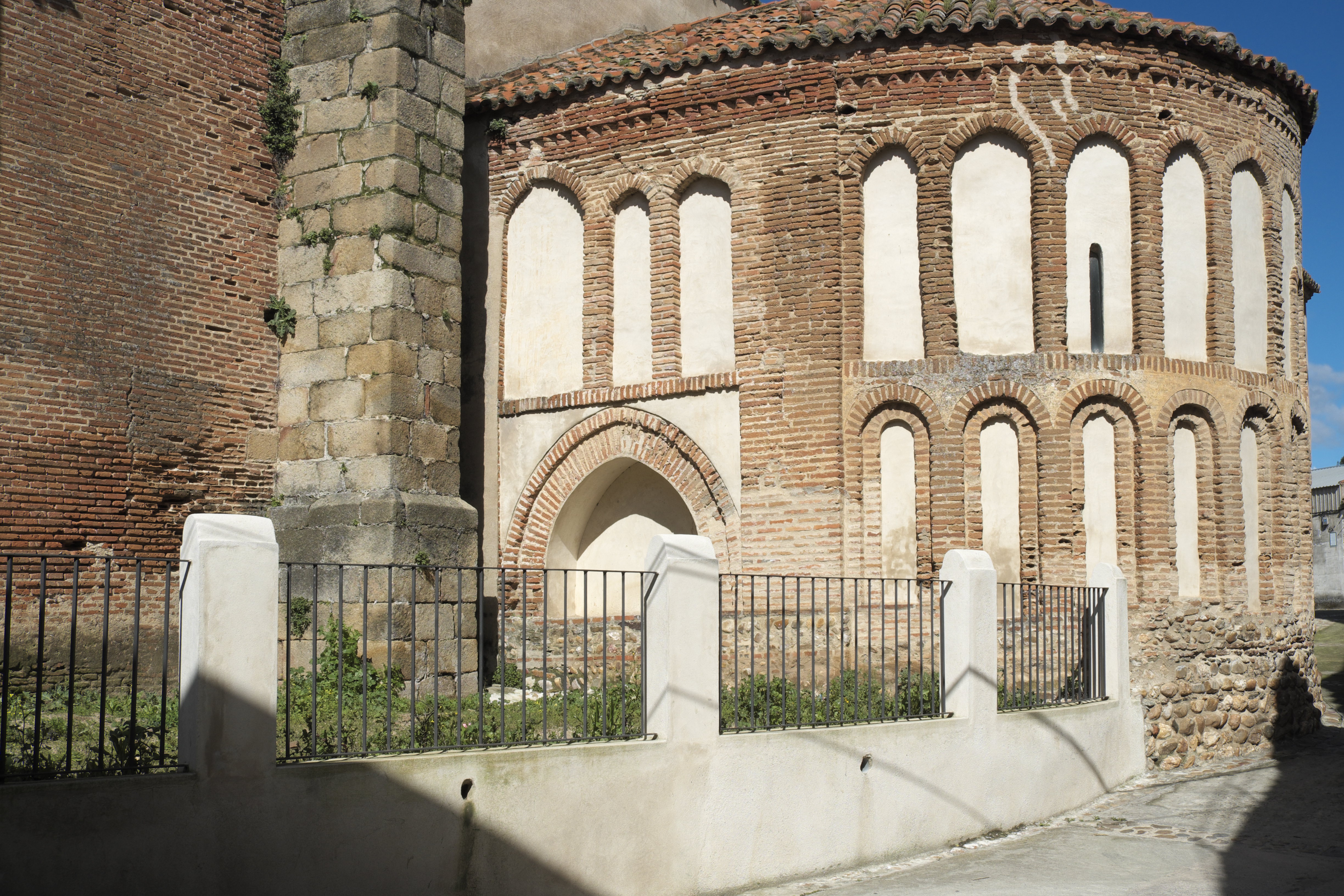 Pfarrkirche Nuestra Señora de la Asunción in Galisteo in der Provinz Cáceres (Extremadura/Spanien), Apsis im Mudéjar-Stil, aus dem 13. Jahrhundert